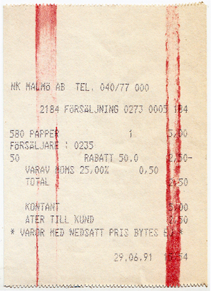 Det sista kvittot. Lördagen den 29 juni 1991 Kl 16:00 stängdes NK i Malmö efter 28 år. Rödmarkeringen visar att rullen nästan är slut 6 minuter före stängningsdags, inköpet var ett A4 anteckningsblock, pris 2,50:- med 50% rabatt.